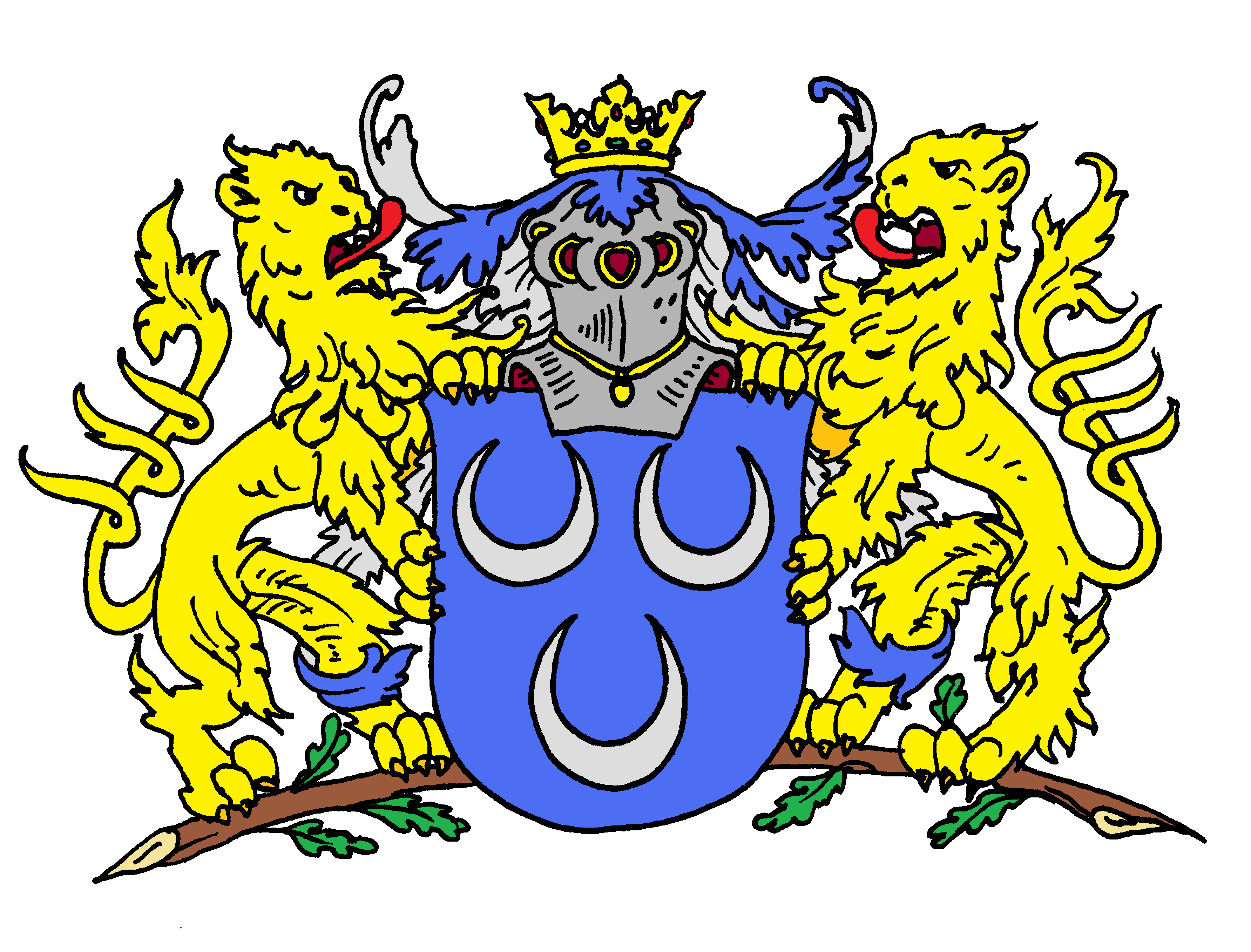 Wappen der von Monroy. Das Geschlecht soll seinen Ursprung in Poitou havben. Charles du Verger de Monroy flüchtete nach der Aufhebung des Edikts von Nantes 1685 mit seiner Familie zunächst nach Holland. Von dort kam er nach Celle, wo er am welfischen Fürstenhof diente.